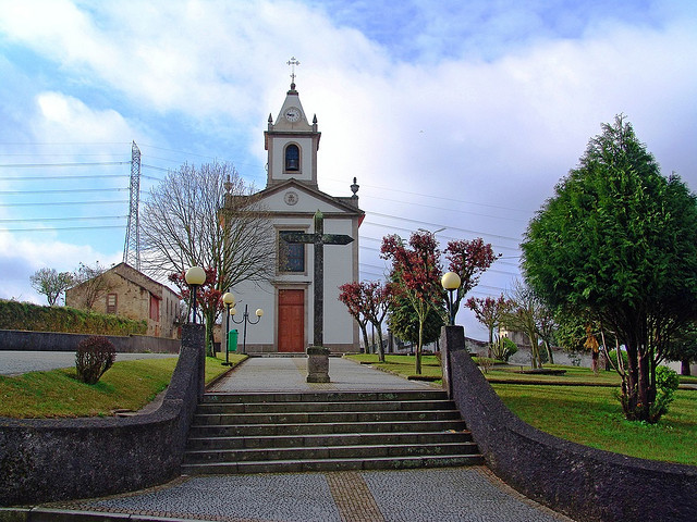 Igreja de Sermonde